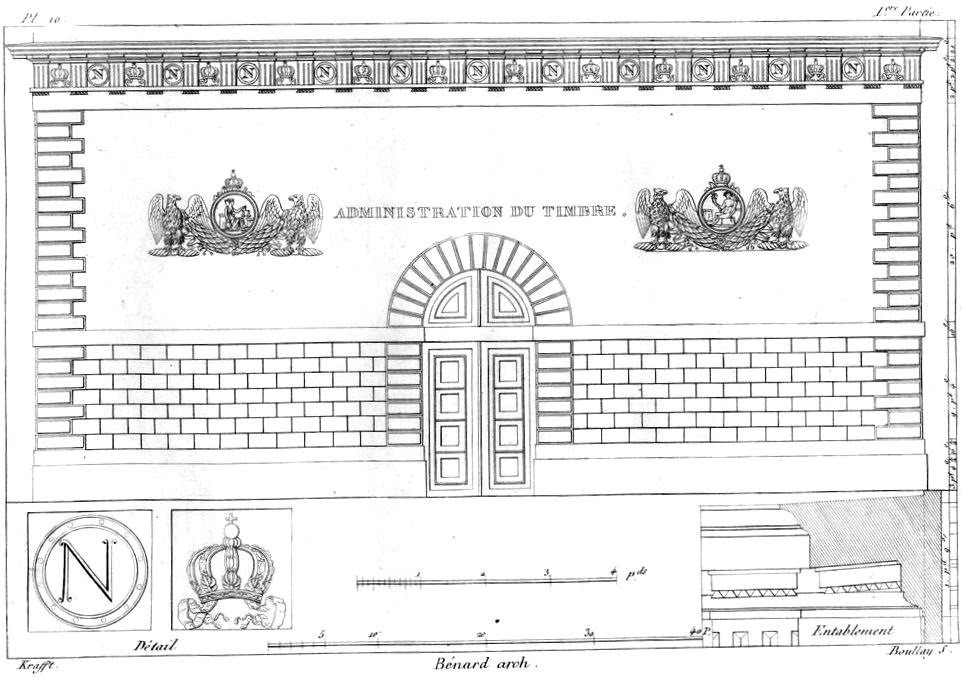 "Élévation de la porte de l'administration du Timbre-Royal, rue de la Paix, par Bénard, architecte." (pl. 10 de : Jean-Charles Krafft, Portes cochères et portes d'entrées des maisons et édifices publics de Paris, 2e édition, Paris, 1838, p. 322).